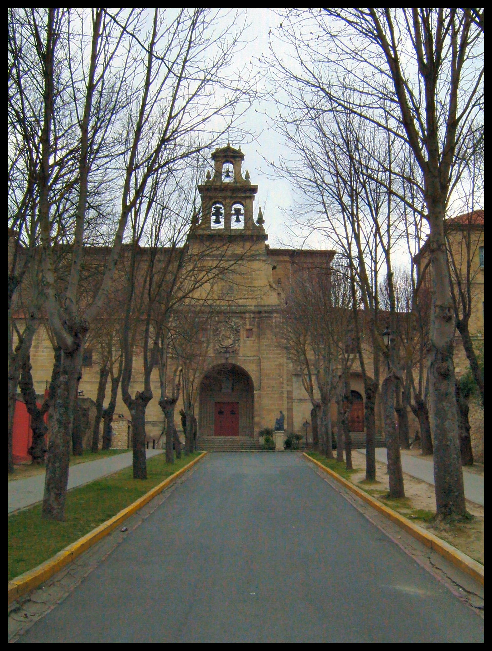 Espadaña Sagrados Corazones - Miranda de Ebro - Spain